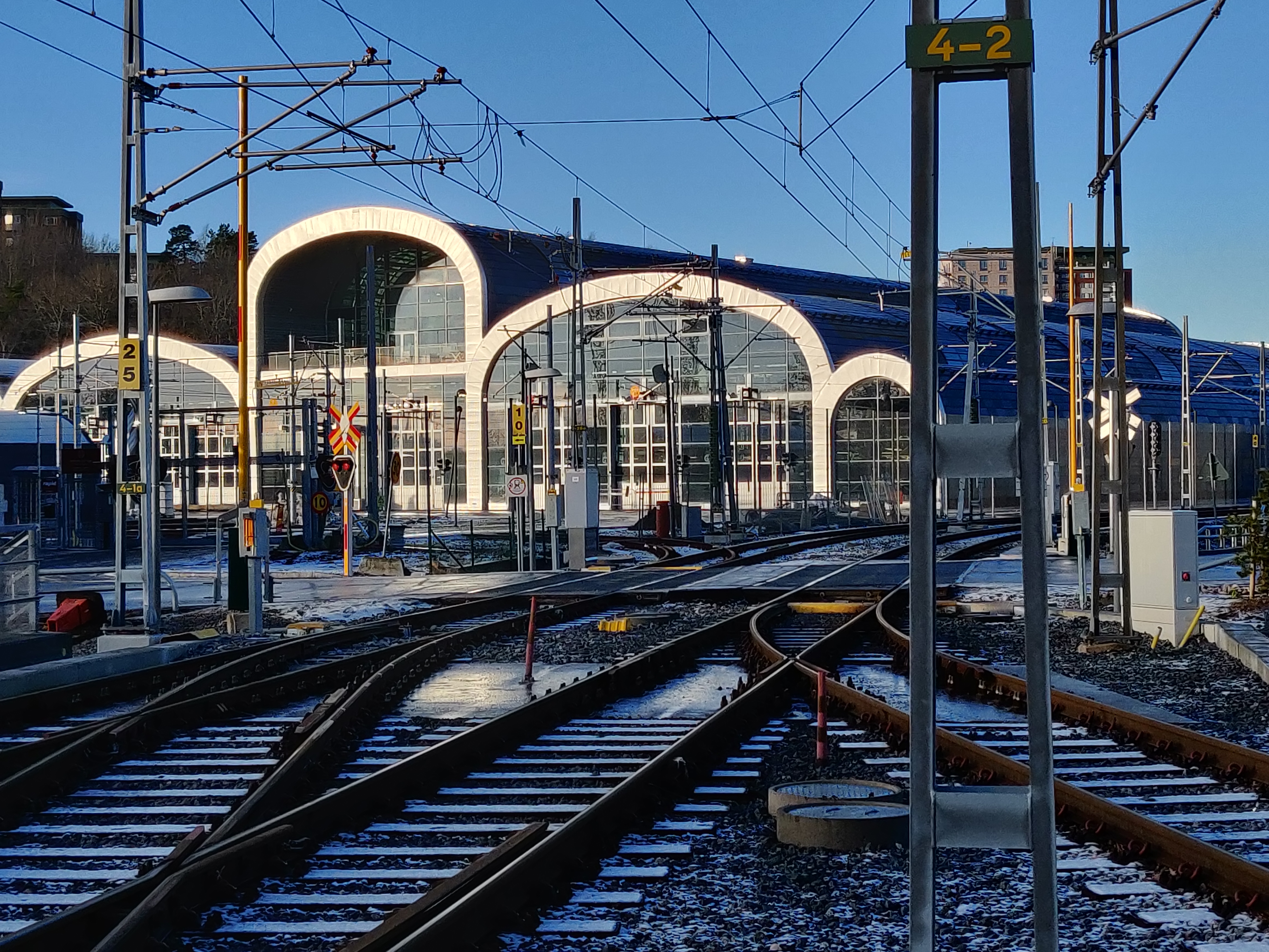 Nya AGA-depån för Lidingötågen